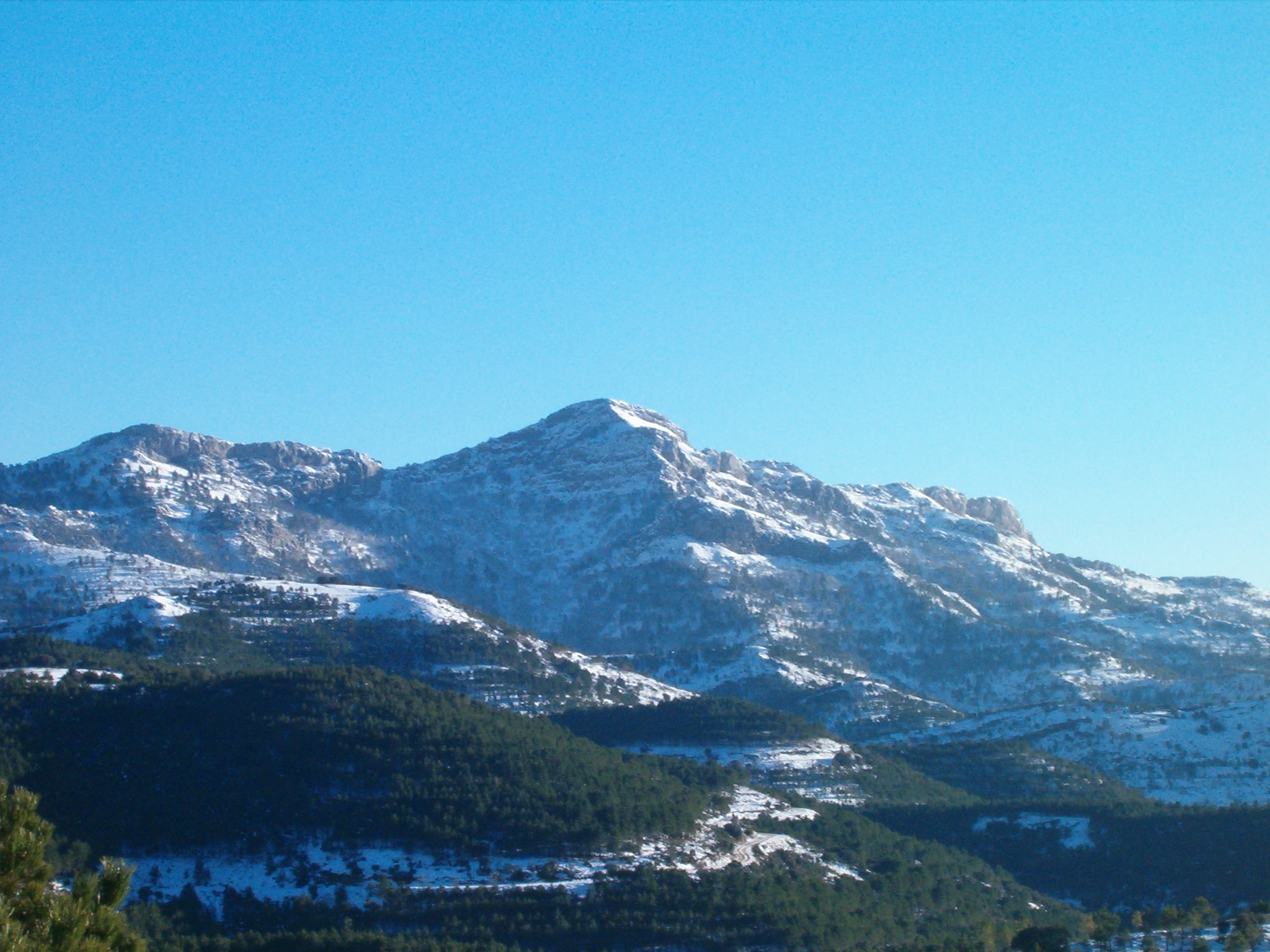 Pico Almenaras en Albacete